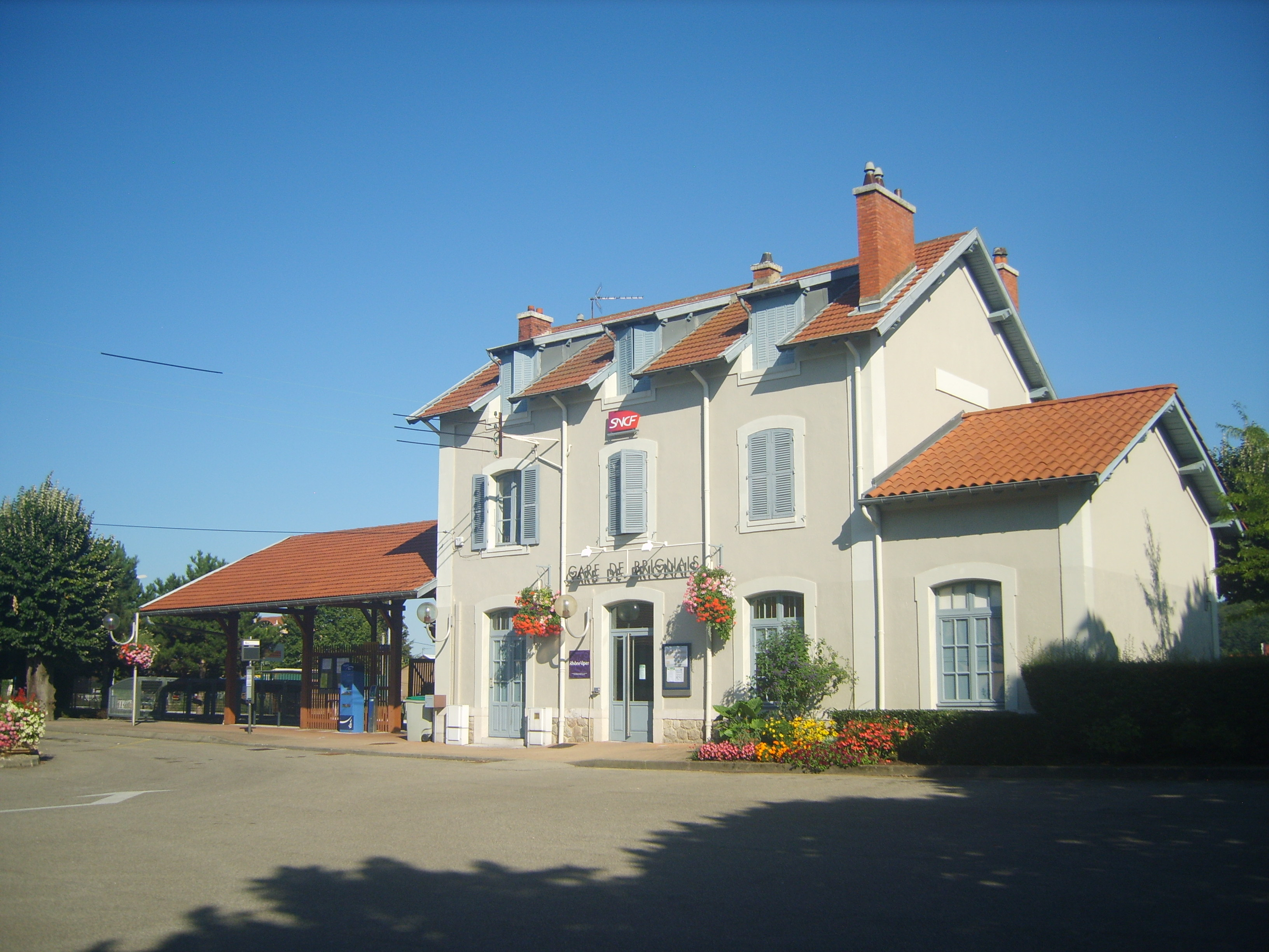 Photo prise en été 2010.